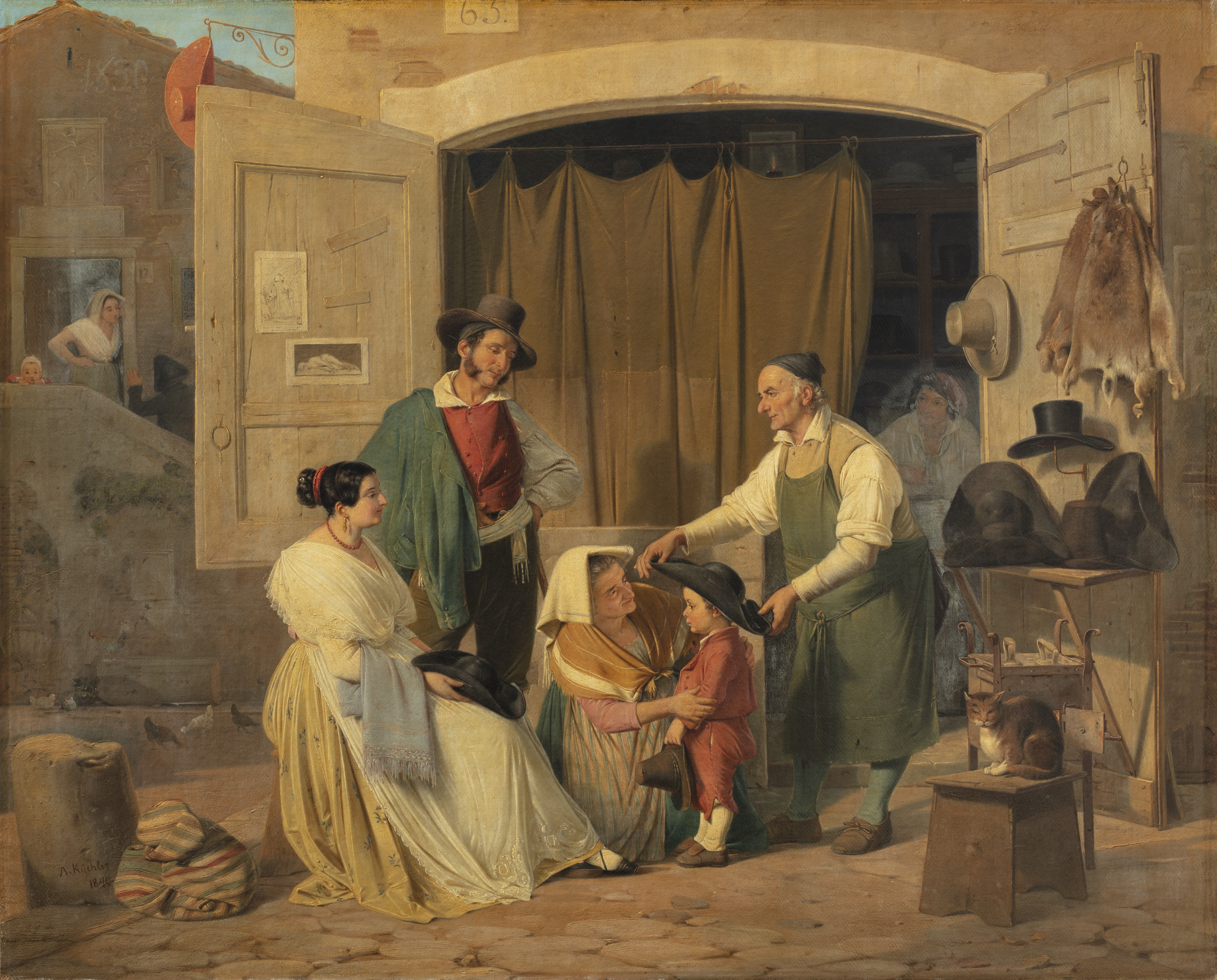 Danish: Et par romerske almuefolk køber en hat til deres lille søn som skal være abbate Roman peasants buying a hat for their little son, who is to be an abbate